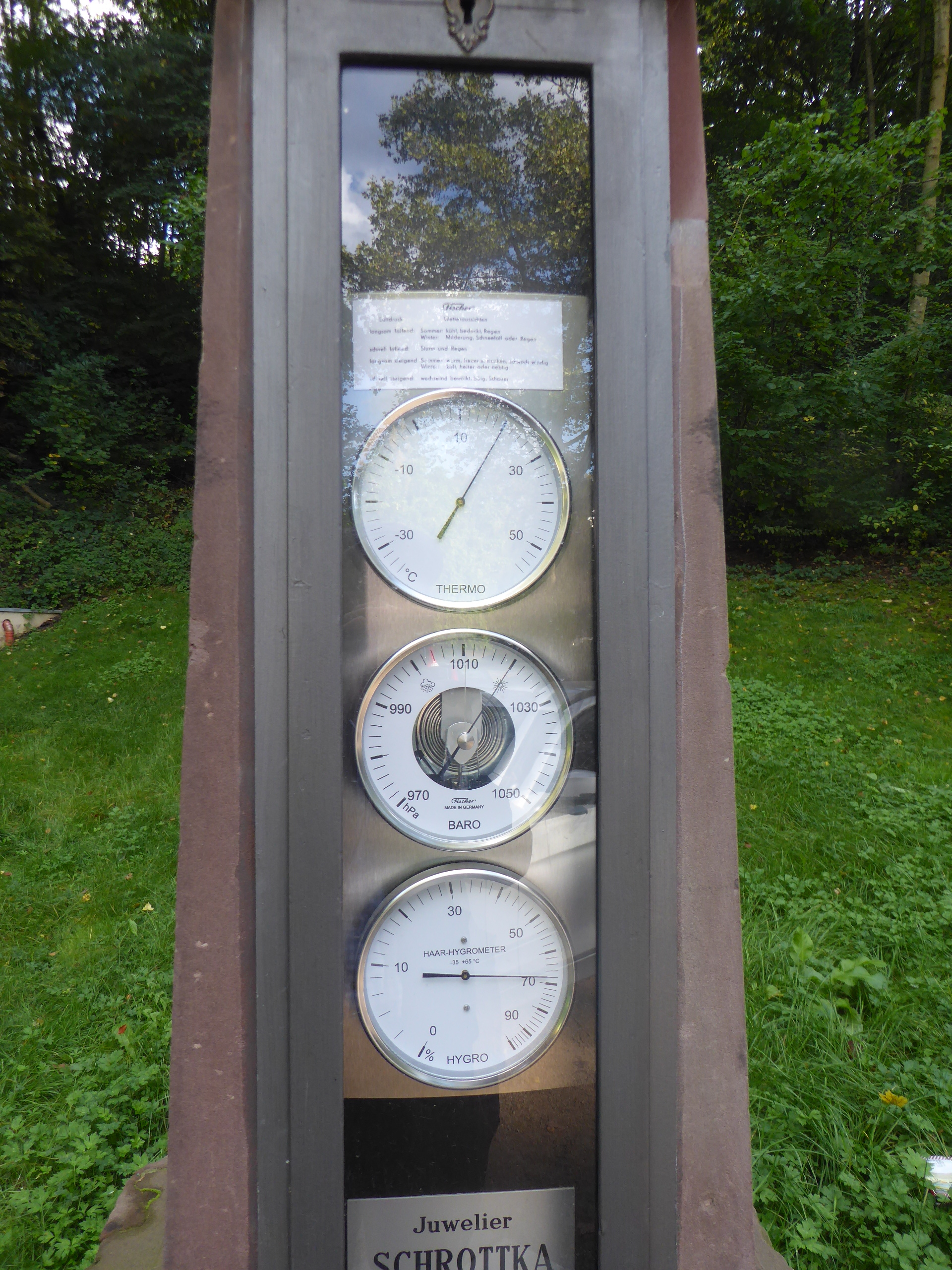 Anleitung und moderne Instrumente an der Godesberger Wettersäule